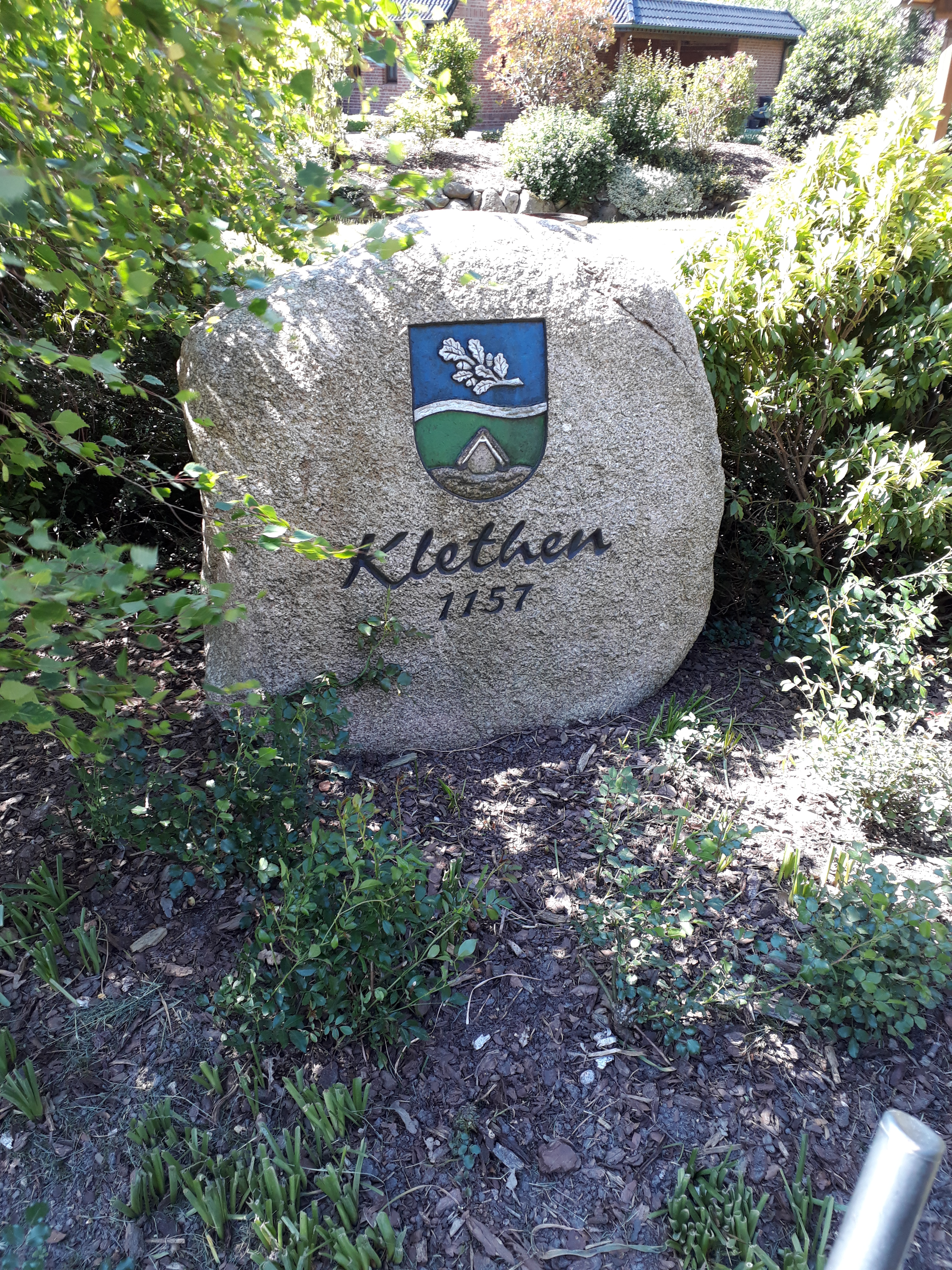 Findling mit Ortswappen in Klethen, Ahlerstedt.